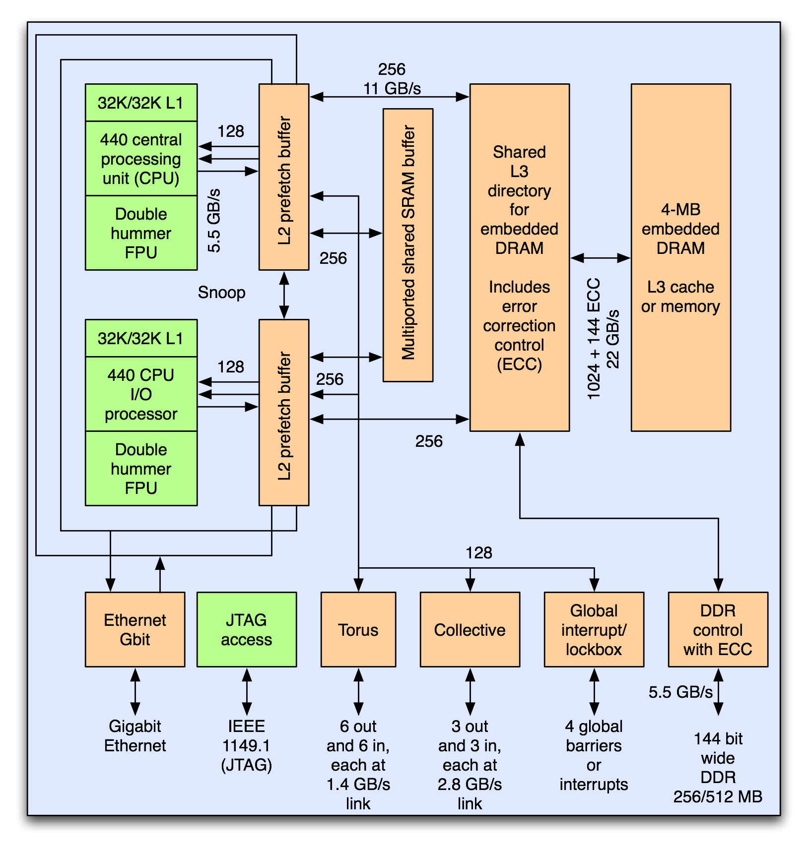 Schema Blue Gene/L scheda